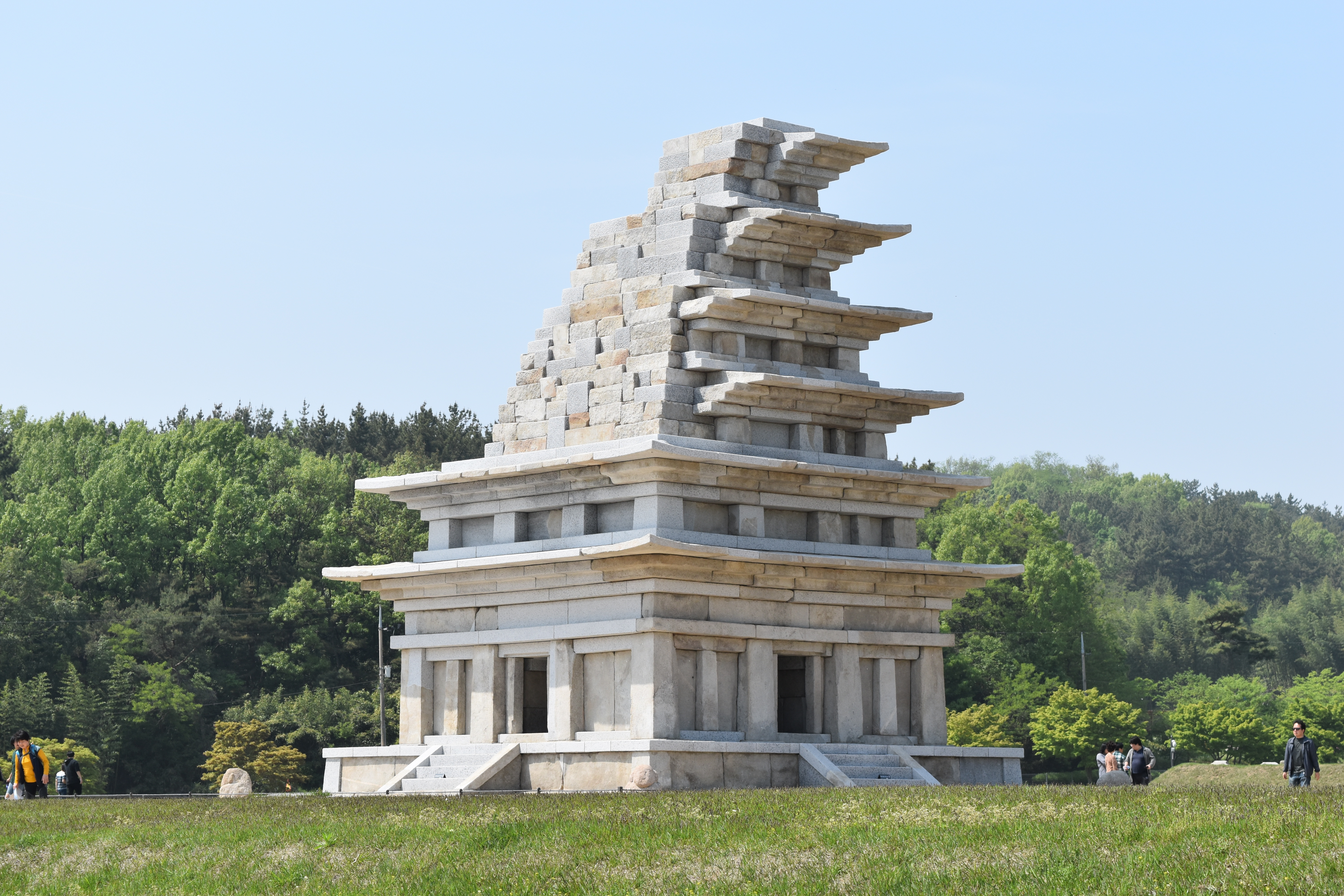 미륵사지 석탑